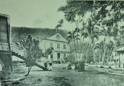 Antigo Hospital Marítimo de Santa Isabel localizado em Jurujuba, Niterói.